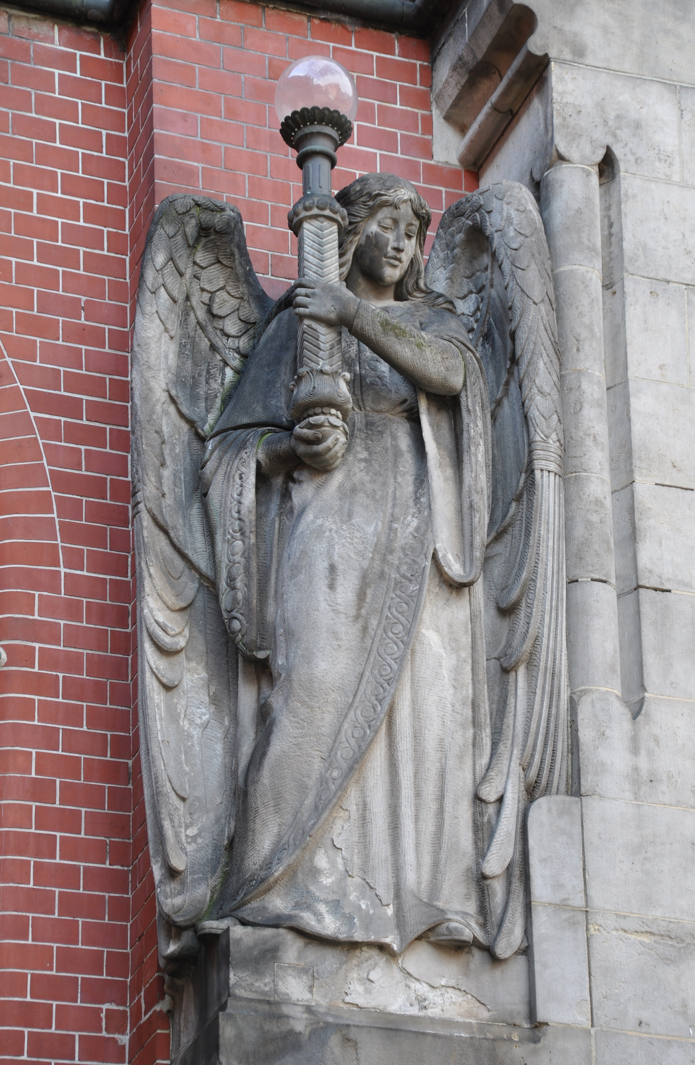 Altenburg, ev. Brüderkirche, Portal, Engelsfigur